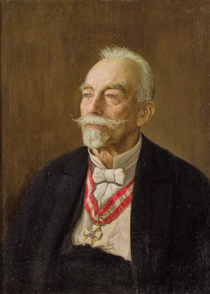 Ritratto di Luigi Pajer de Monriva, olio su tela. Gorizia, Musei Provinciali.